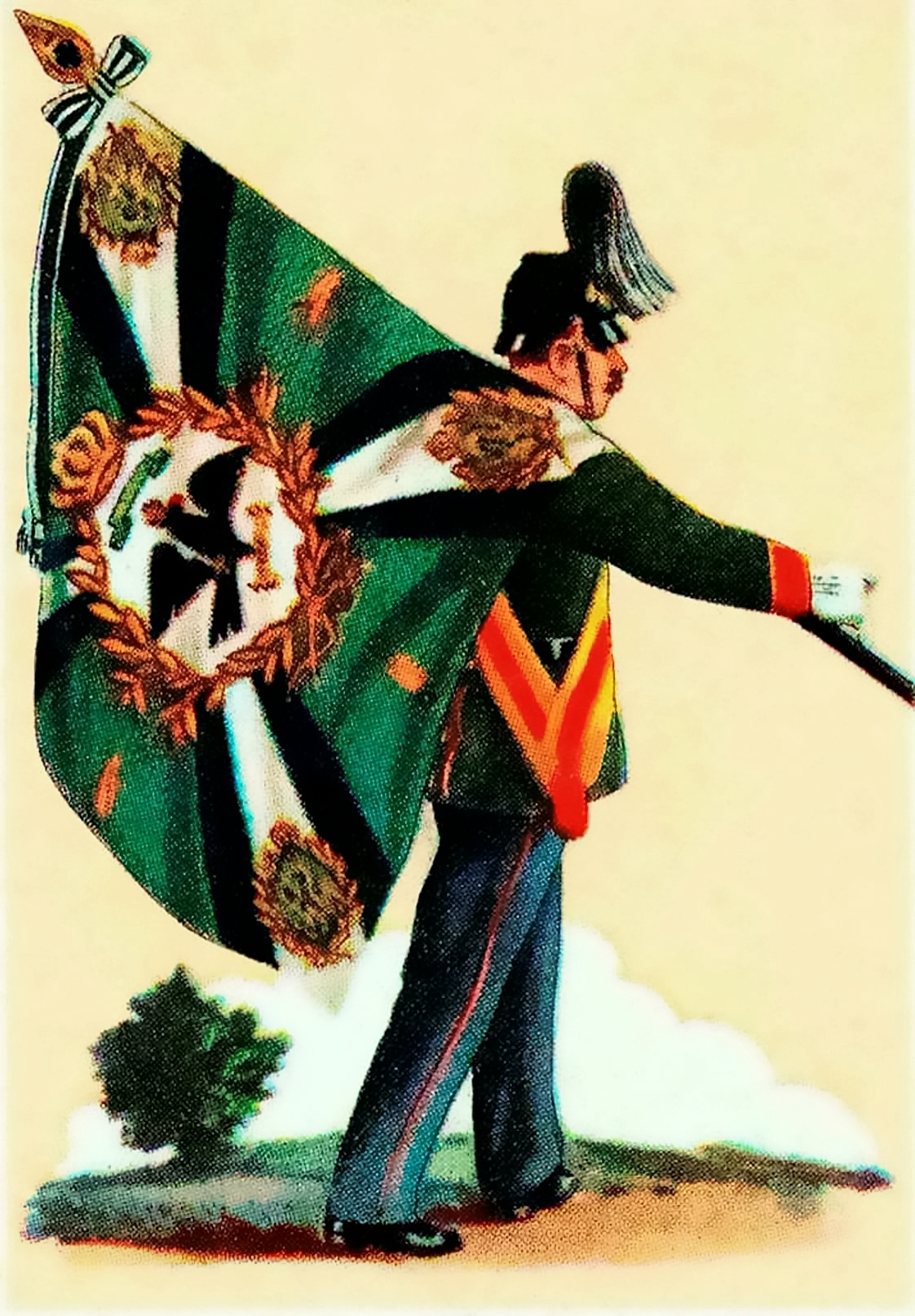 Fahne des Brandesburgischen Jäger-Bataillons Nr. 3, verliehen am 28. August 1902.